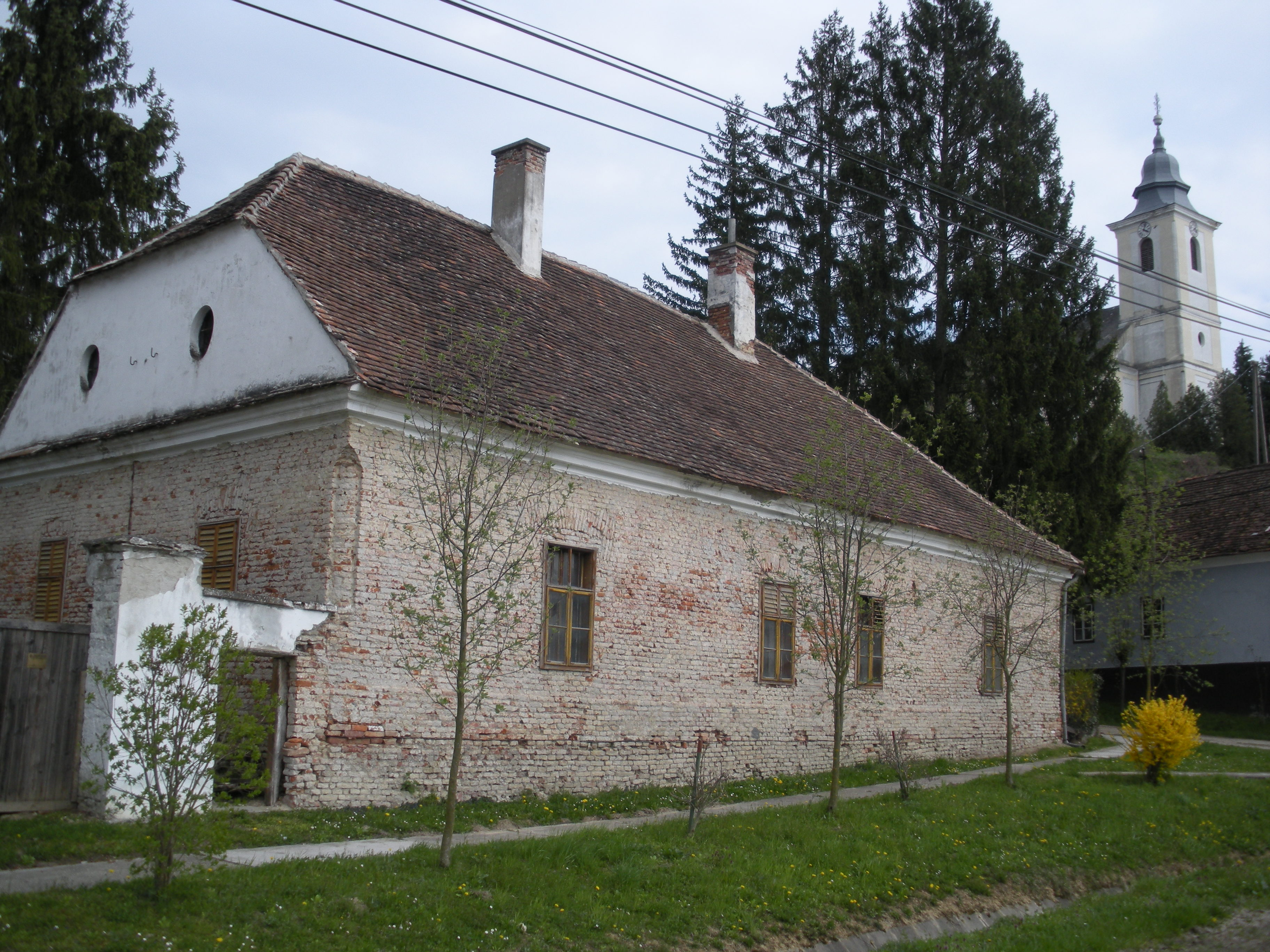 A zalamerenyei paplak épülete, Zalamerenye, Zala megye